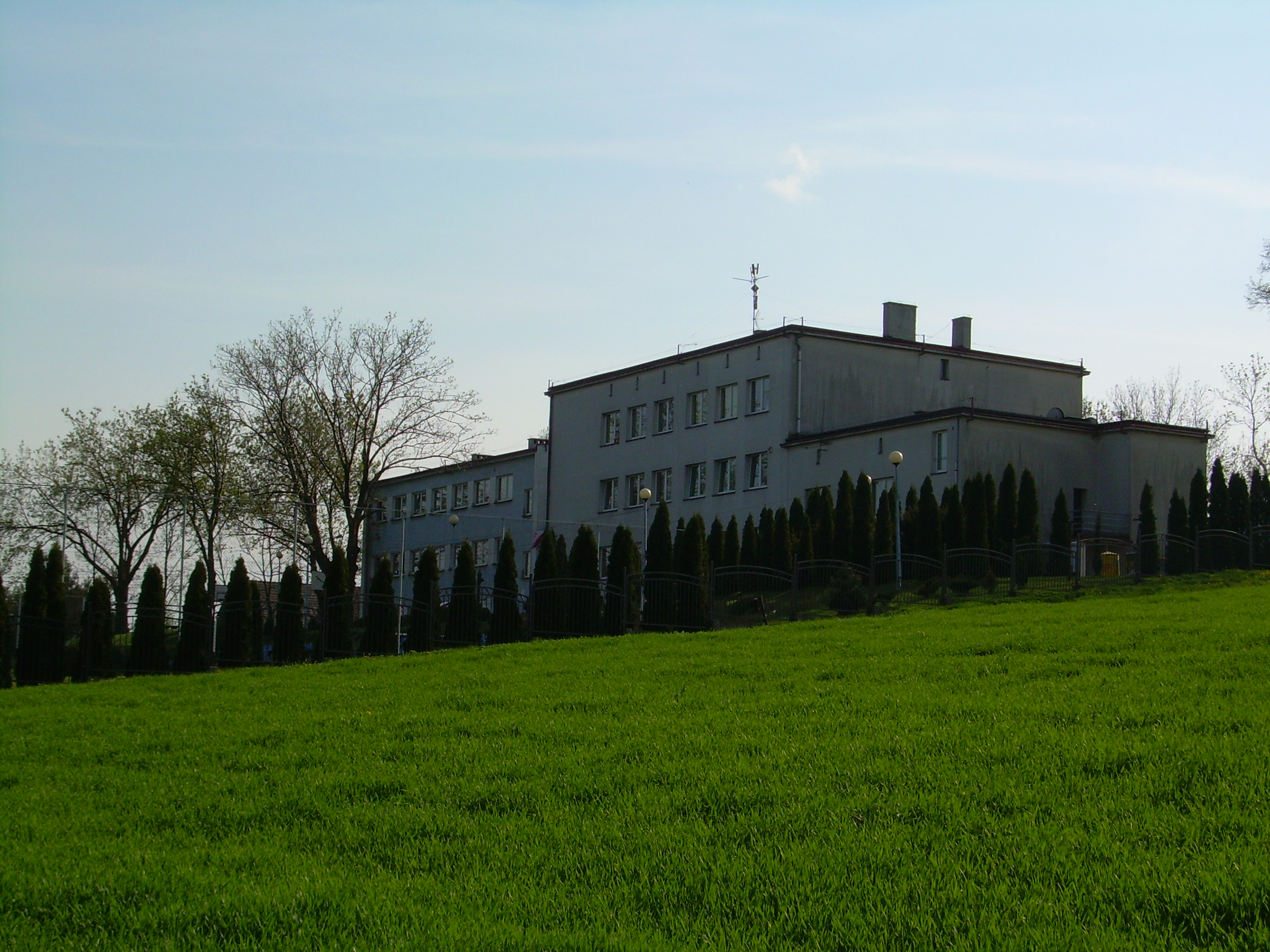 Zespół Szkół w Mszanie (SP i Gimnazjum)